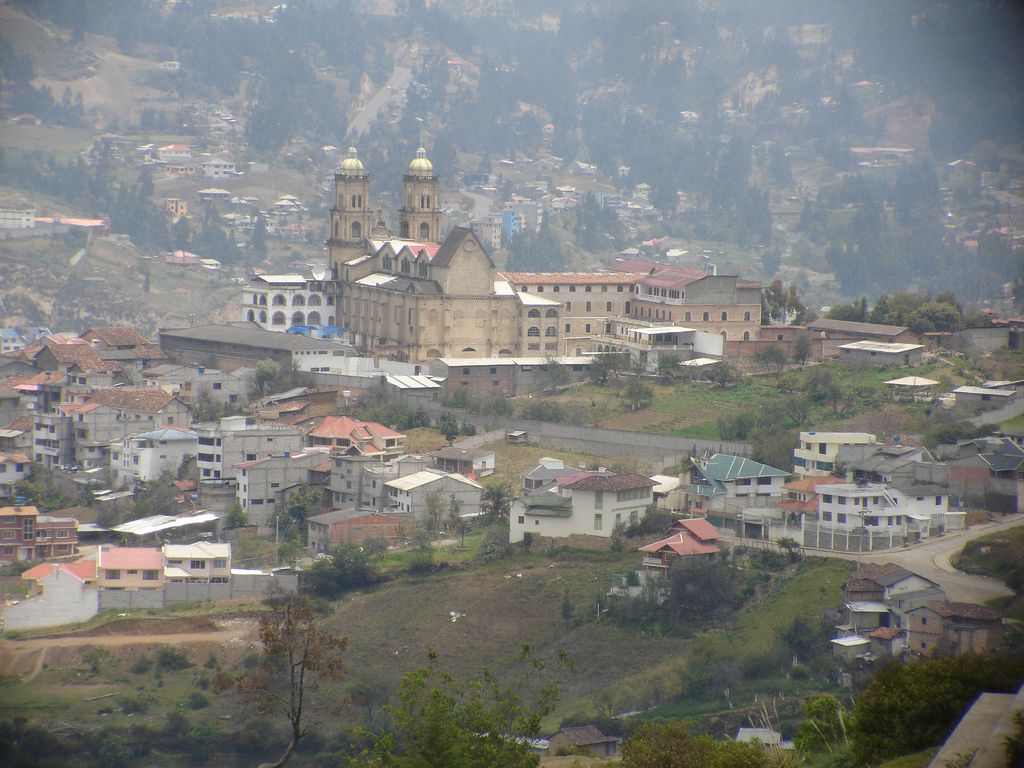 San Francisco church at Azogues, Ecuador